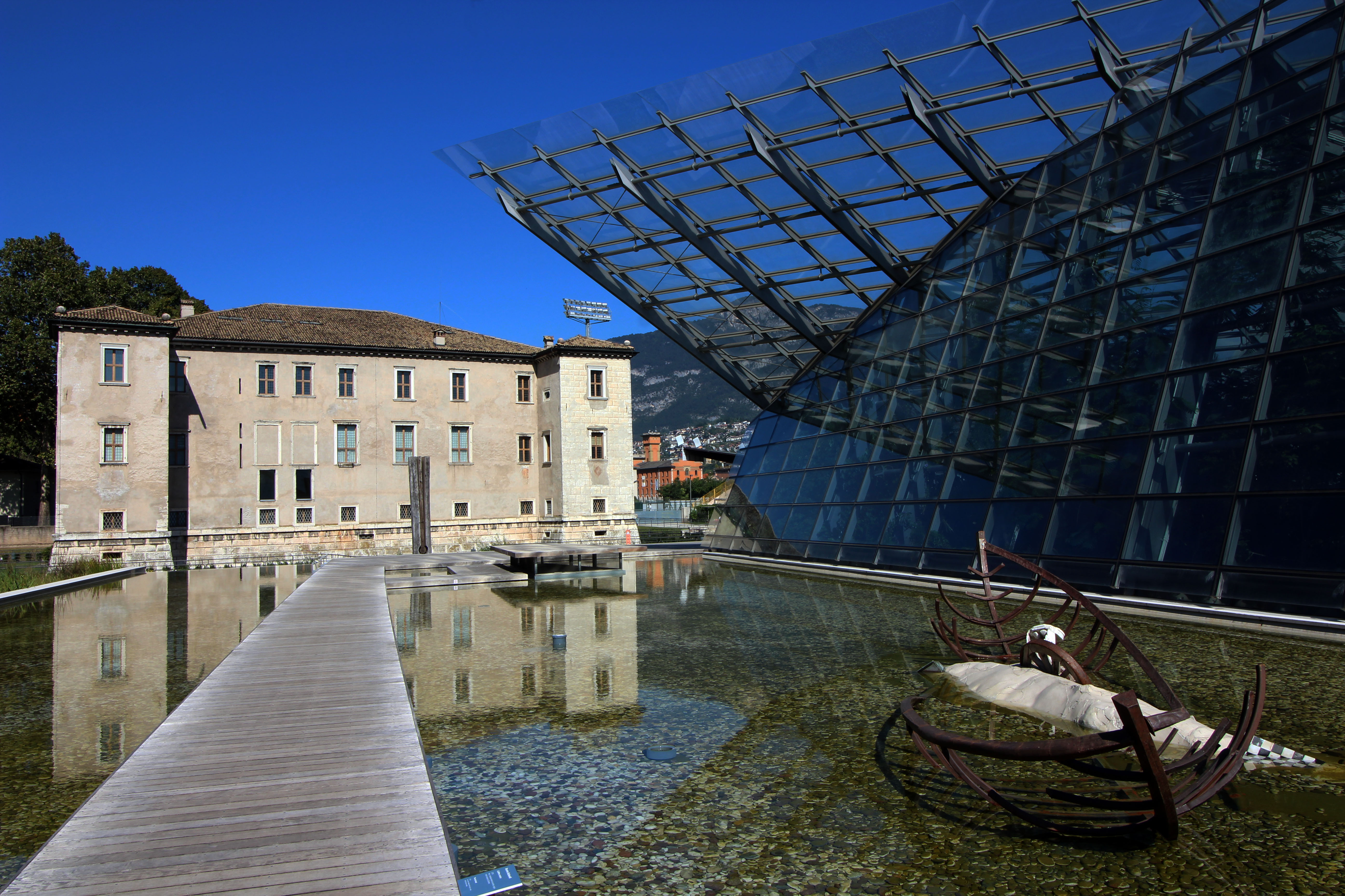 Palazzo delle Albere Bello, massiccio nella sua 'armatura'! This is a photo of a monument which is part of cultural heritage of Italy.